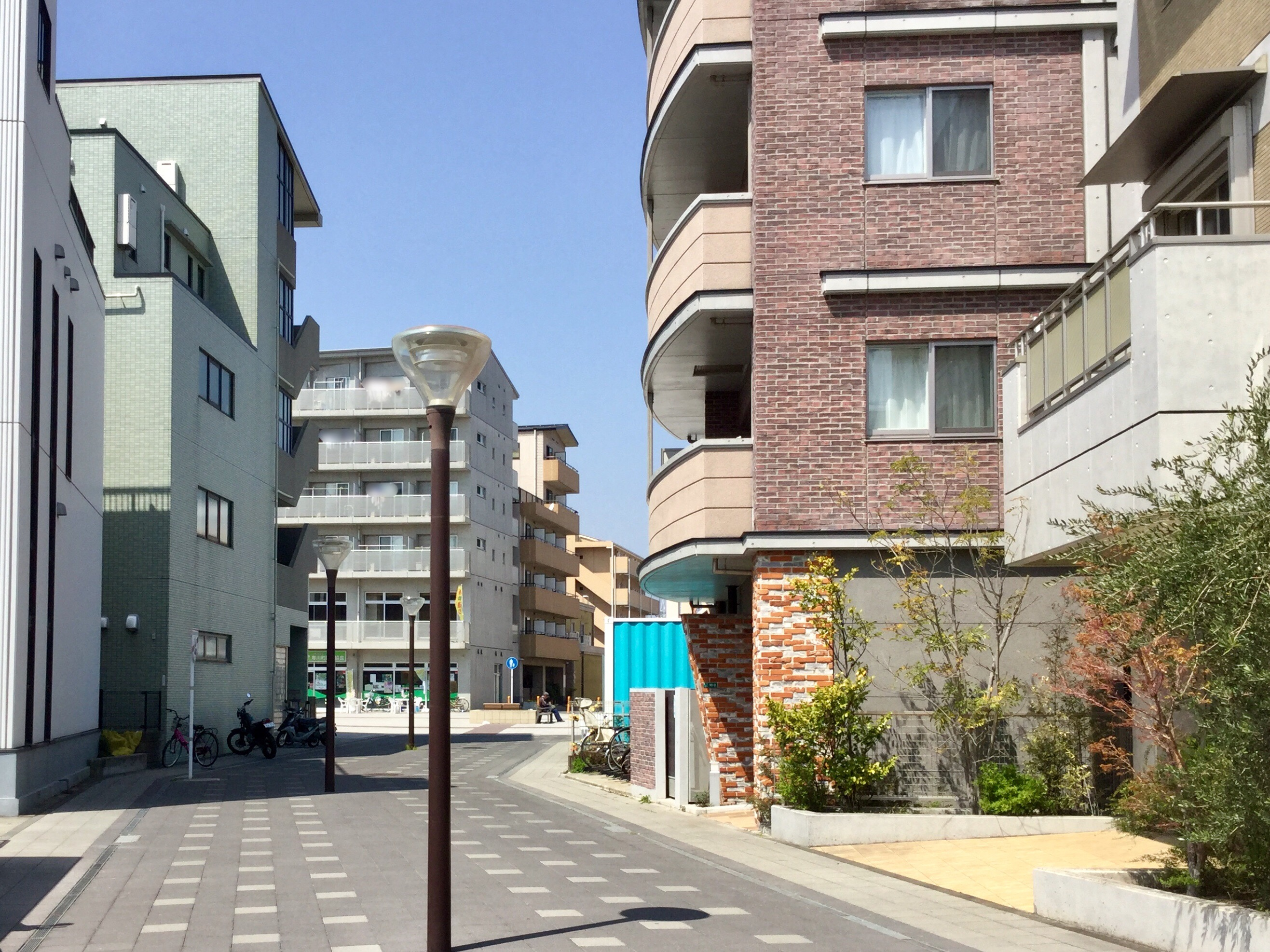 寒川駅北口にある歩行者専用道路